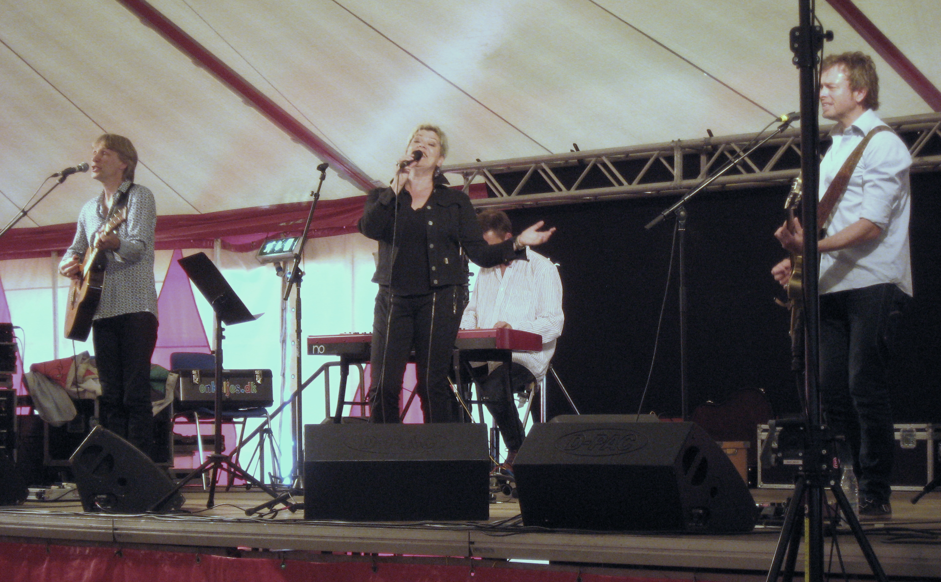 På Slaget 12 i Jerslev, 2011